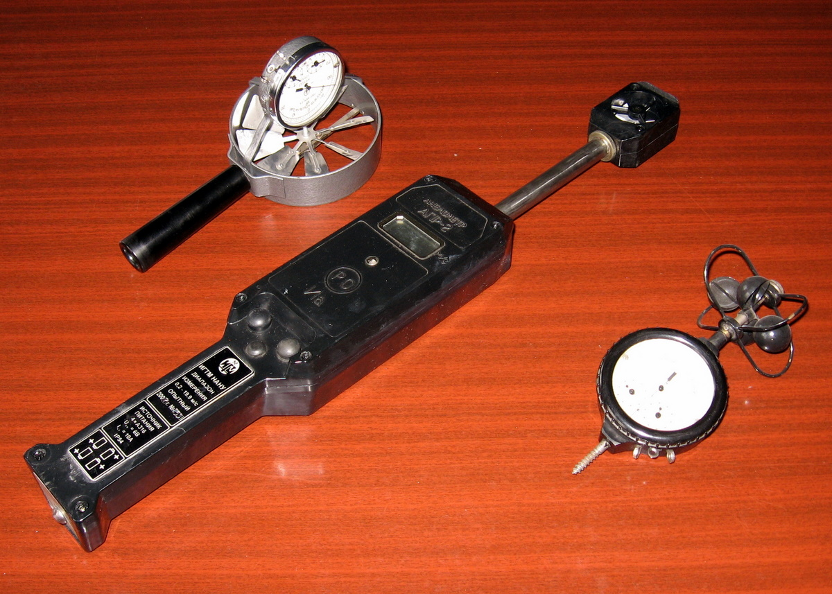 Mine anemometers – Шахтні анемометри різних типів